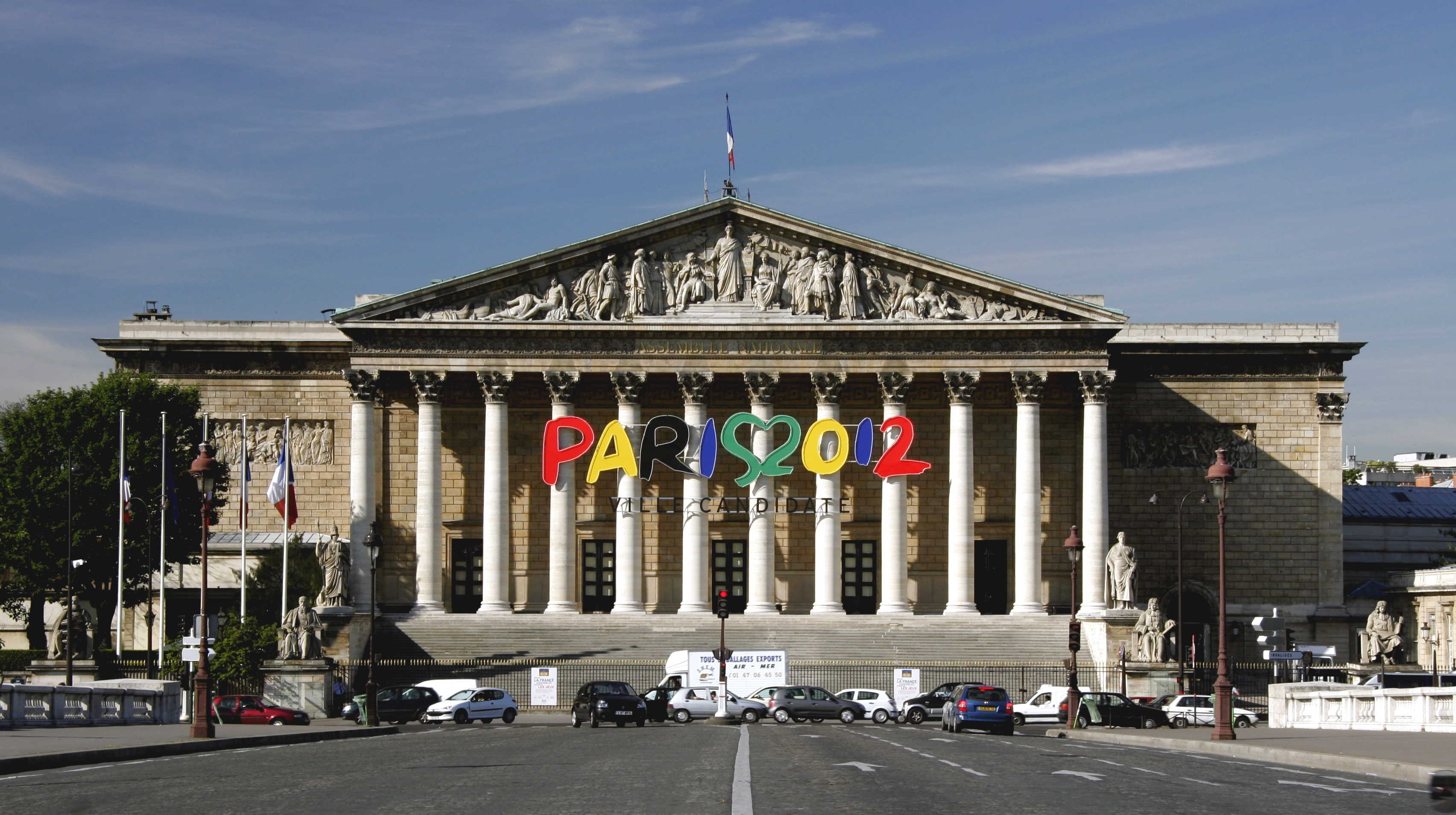 Palais Bourbon, Paris